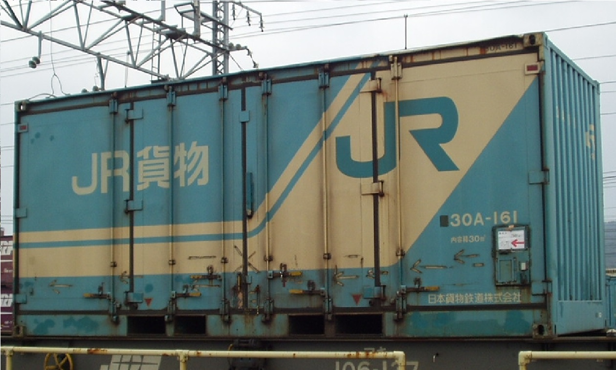 撮影地＝【岡山／旧、西岡山貨物駅】